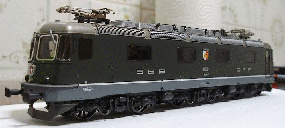 Re 6/6 11669 Hag